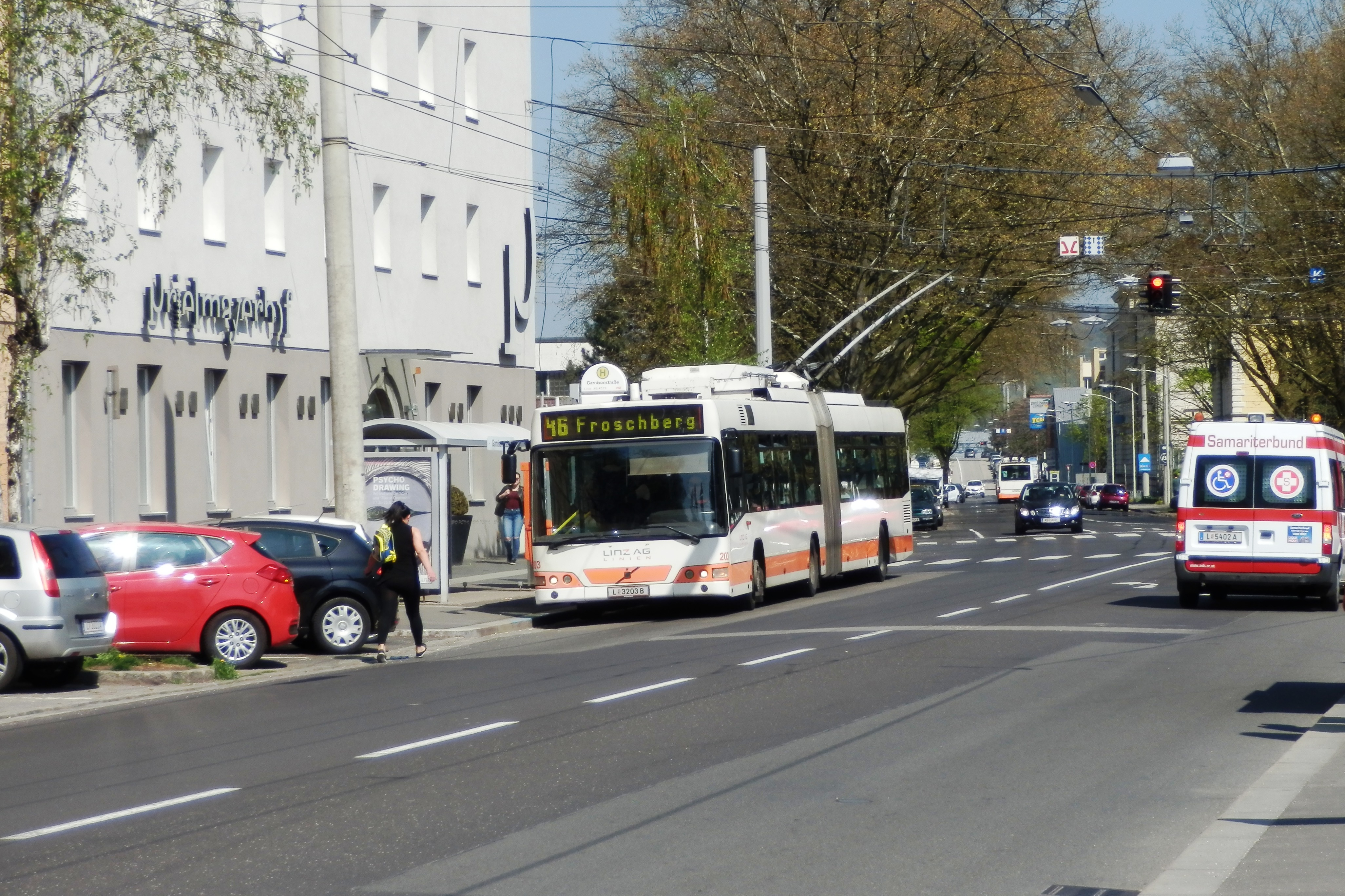 Linz AG Obus - Linie 46 in der Weißenwolffstraße bei der Haltestelle Garnisonstraße vor dem Hotel Prielmayerhof. Hier befand sich die Endstation der Straßenbahnlinie M.